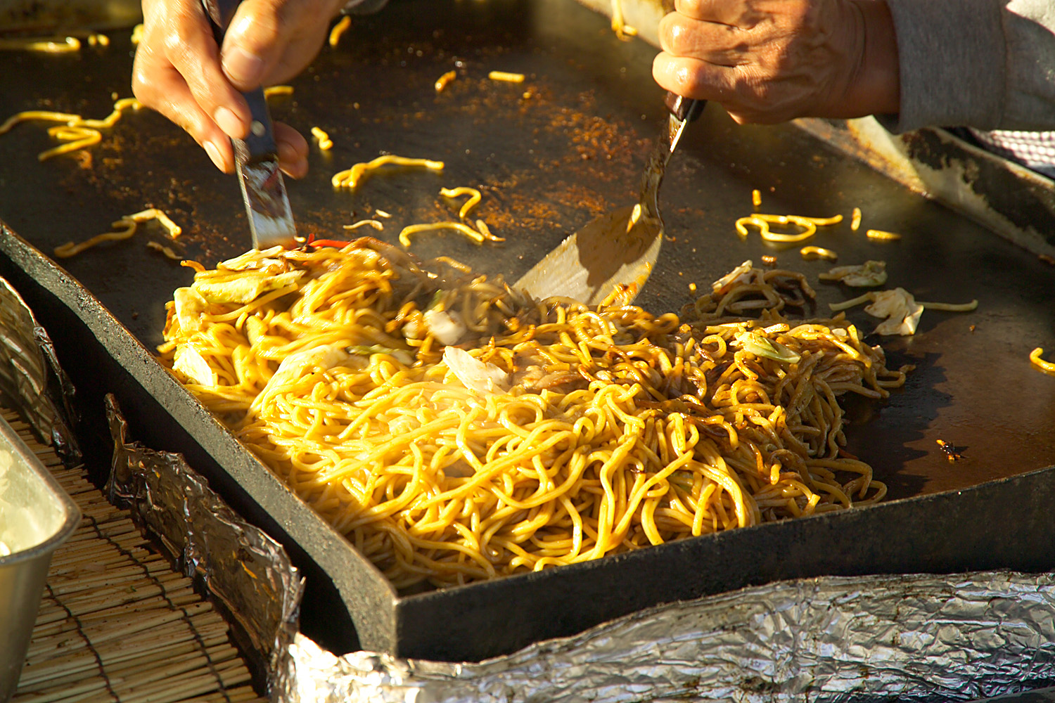 Street vendor in Osaka, Japan prepares yakisoba noodles.